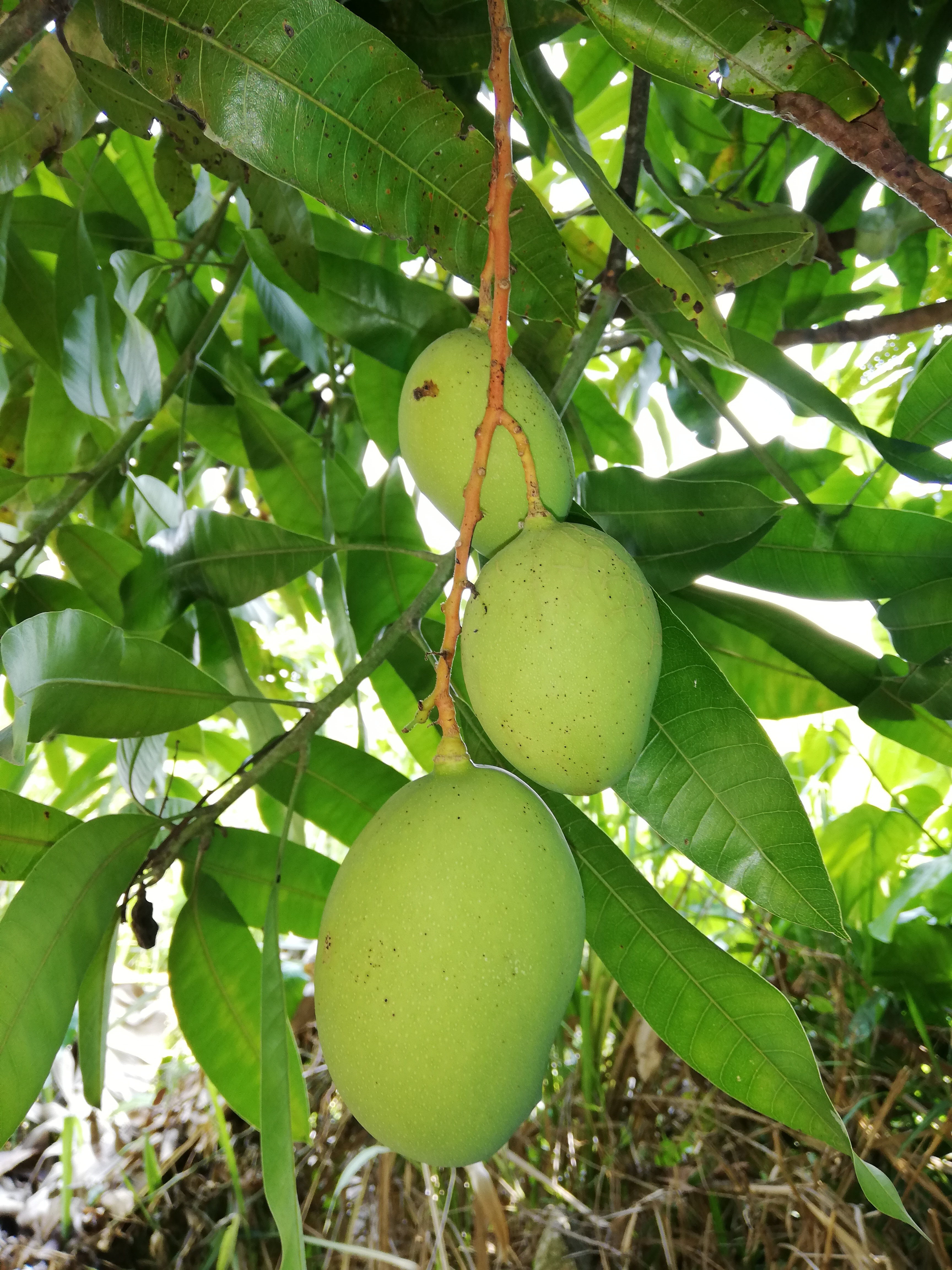 Frutos verdes de Mangifera (árbol de mango) en zonas rurales de Ibagué, Tolima, Colombia.